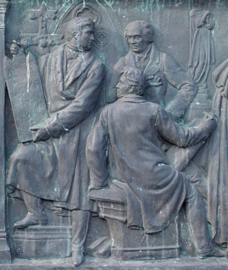 Friedrich Wilhelm III.-Reiterstandbild auf dem Kölner Heumarkt.Detail des Relief an der Südseite mit Melchior und Sulpiz Boisserée und Ferdinand Franz Wallraf (in Köln: Nachguss - das Original steht in Mülheim an der Ruhr, Auftraggeber 1913 war der Mülheimer Bankier Gerhard Küchen ( 26. Januar 1861 in Mülheim an der Ruhr ; † 29. März 1932 ebenda) Demontage des Reliefs von dessen Villa in Mülheim (Residenz Uhlenhorst) und Aufstellung an der Stinnes Hauptverwaltung Ruhrstr. 1 in der Kunststadt Mülheim an der Ruhr, dort erneute Demontage nach Neugestaltung der Fassade und Verlagerung zum Rhein-Ruhr-Zentrum in Mülheim an der Ruhr.